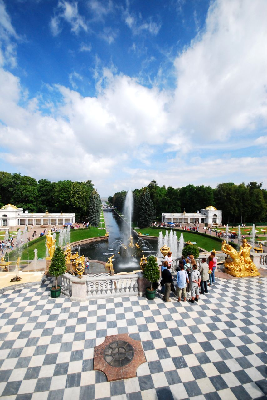 Peterhof in Saint Petersburg, Russia